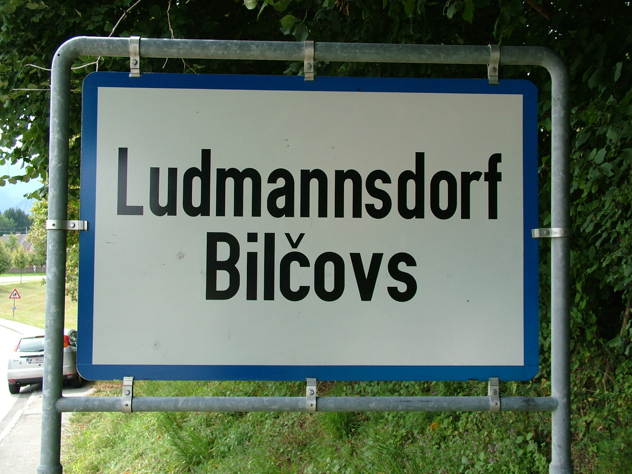 Ortsschild von Ludmannsdorf